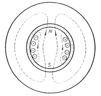 Figura 12.Makina dypolare e realizuar në formë cilindrike me eksitim në rotor.